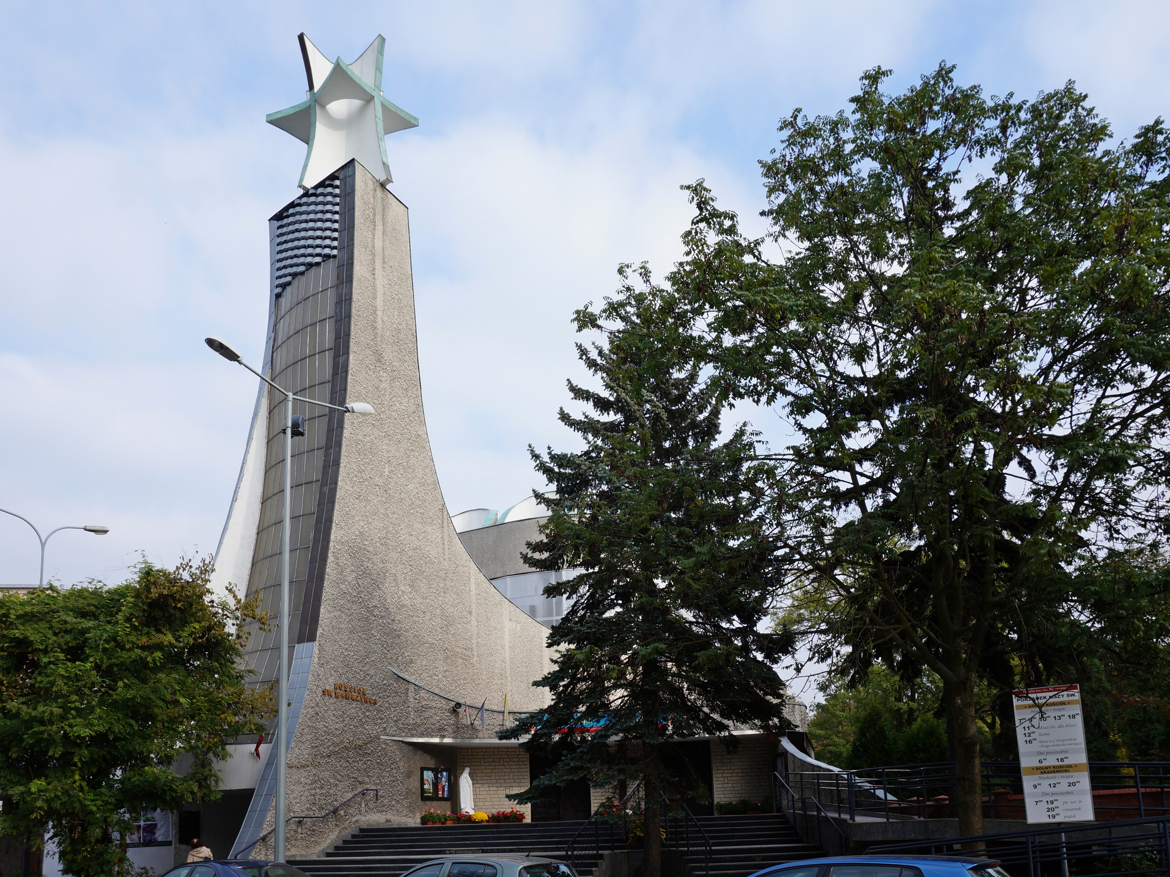 Wrocław - kościół Świętego Wawrzyńca.